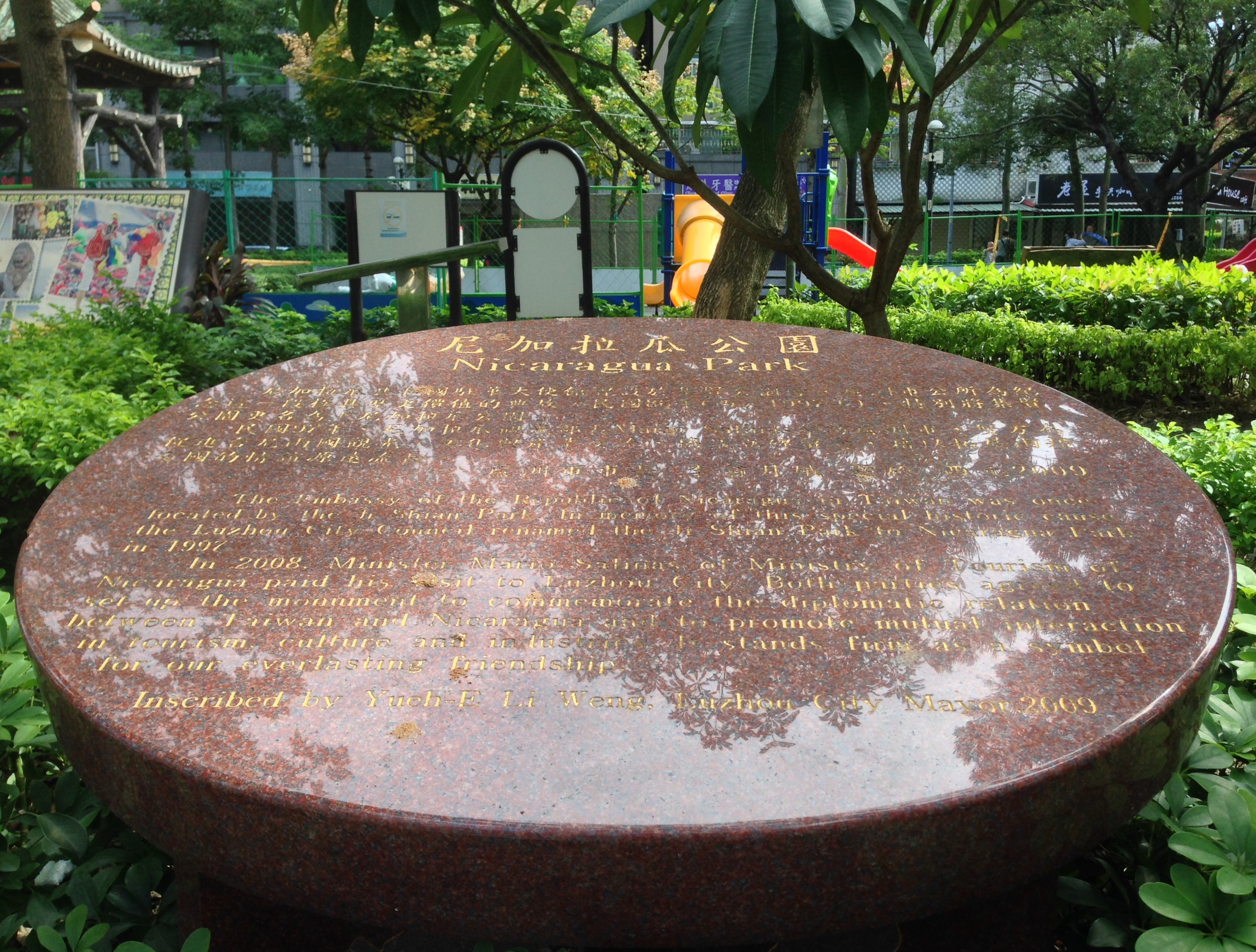 中文（台灣）: 尼加拉瓜公園紀念碑